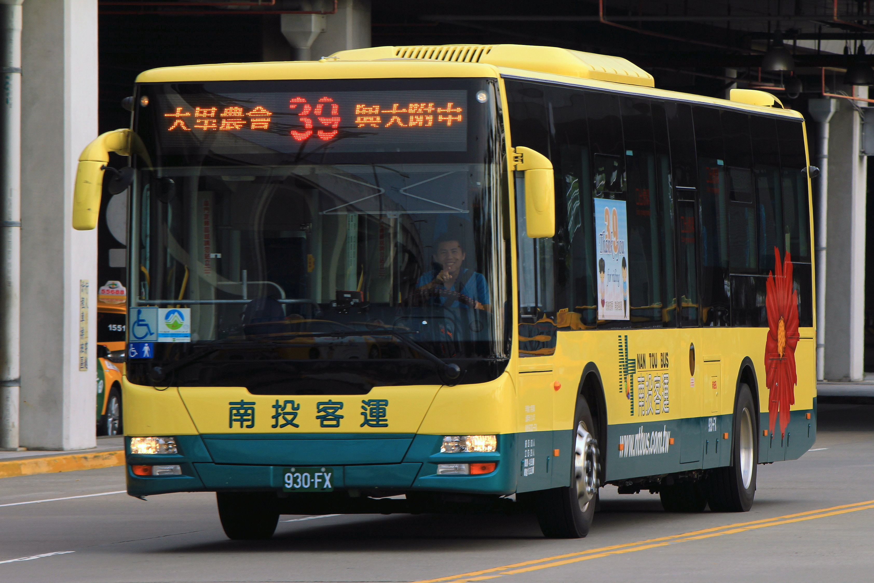 中文（台灣）: 南投客運2014年金旅XML6125大客車930-FX（馨盛車體）